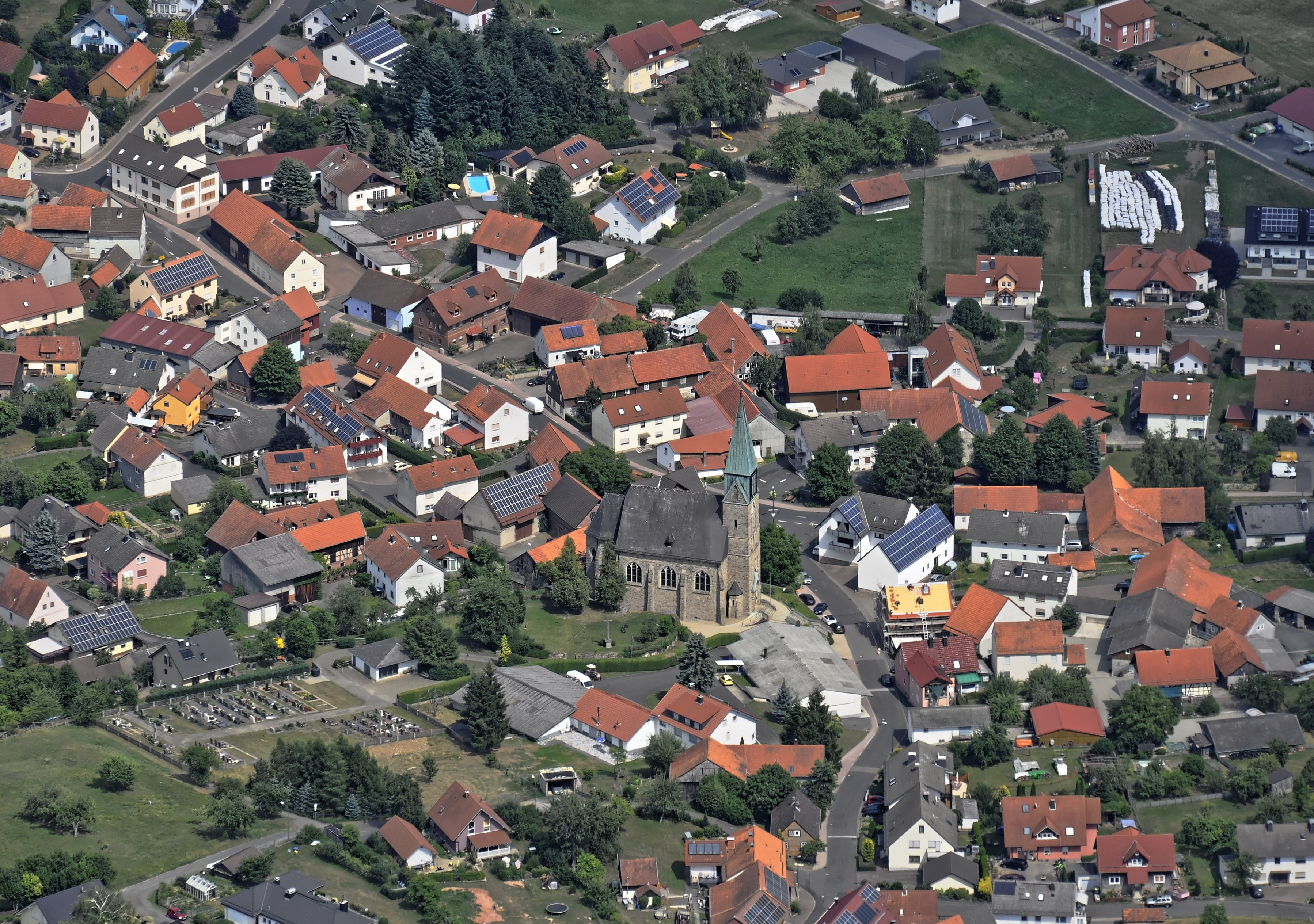 Bilder vom Flug Nordholz-Hammelburg 2015: Büchenberg Ortskern.